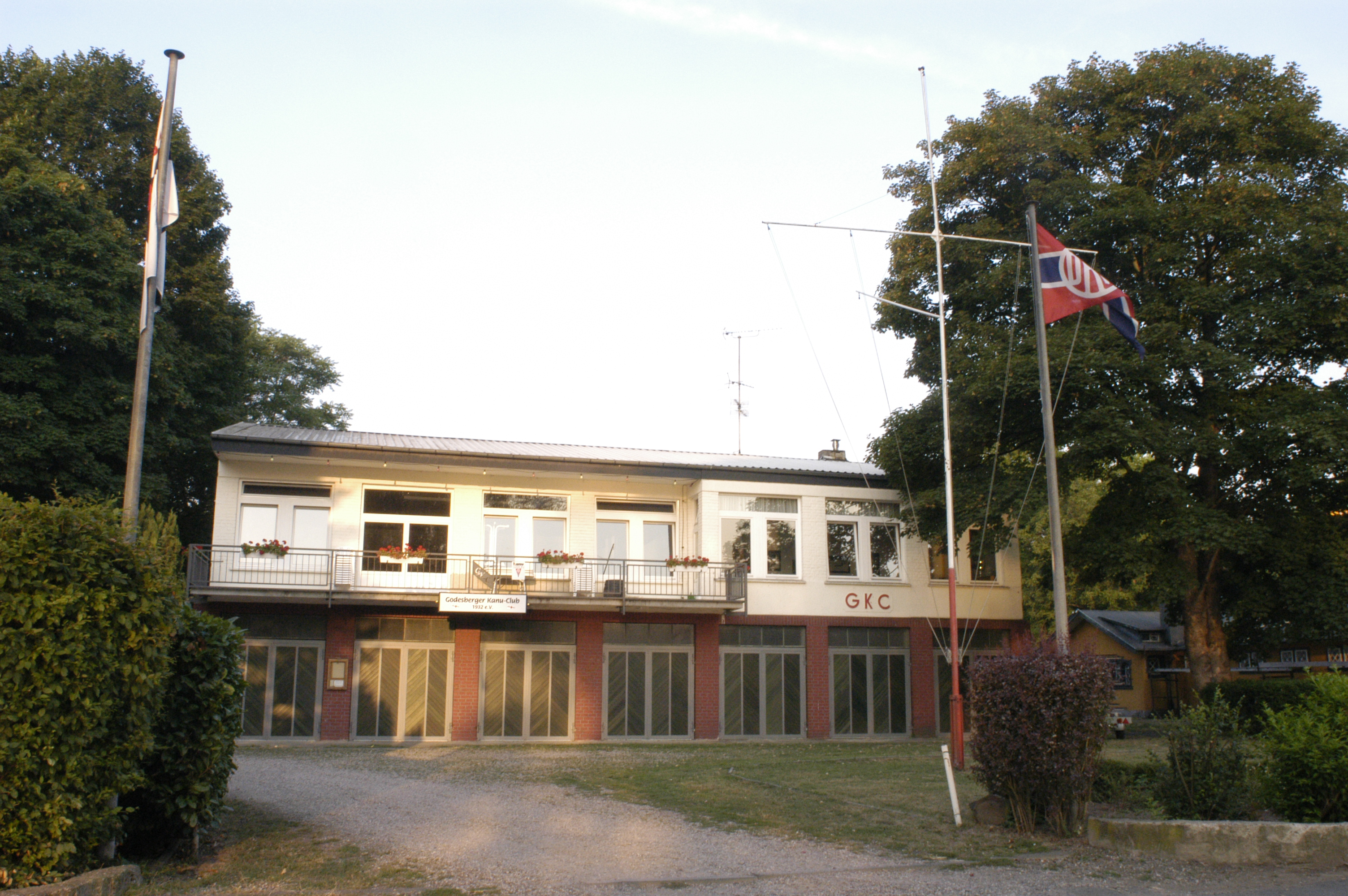 Boots- und Clubhaus des Godesberger Kanu-Clubs, Rheinstraße 96, Bad Godesberg